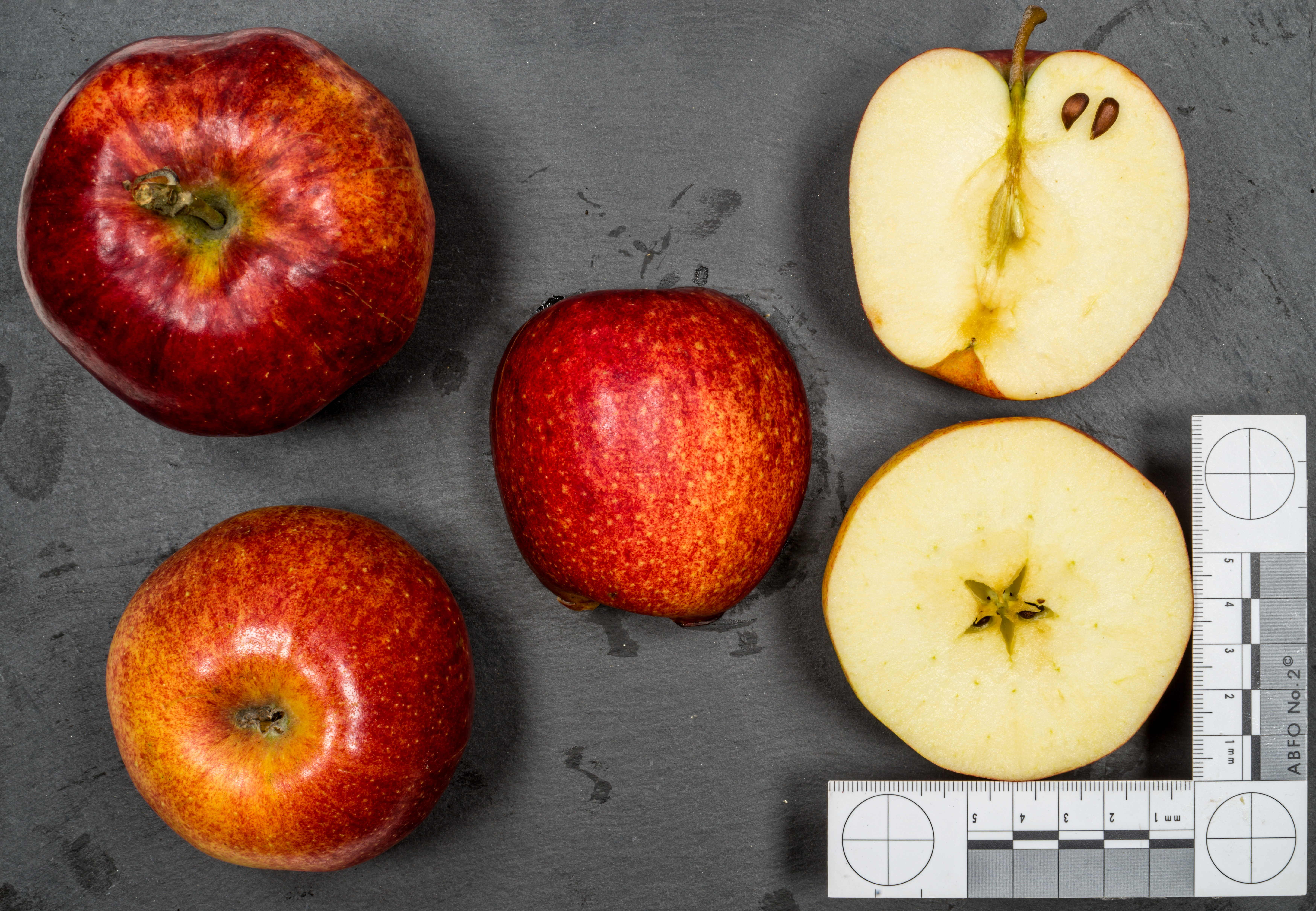 Apfelsorte: Jonagored, Van Morrens Jonagored Mutation von Jonagold Vielen Dank an den Herzapfelhof Lühs in Jork, Altes Land, Deutschland für die freundliche Unterstützung